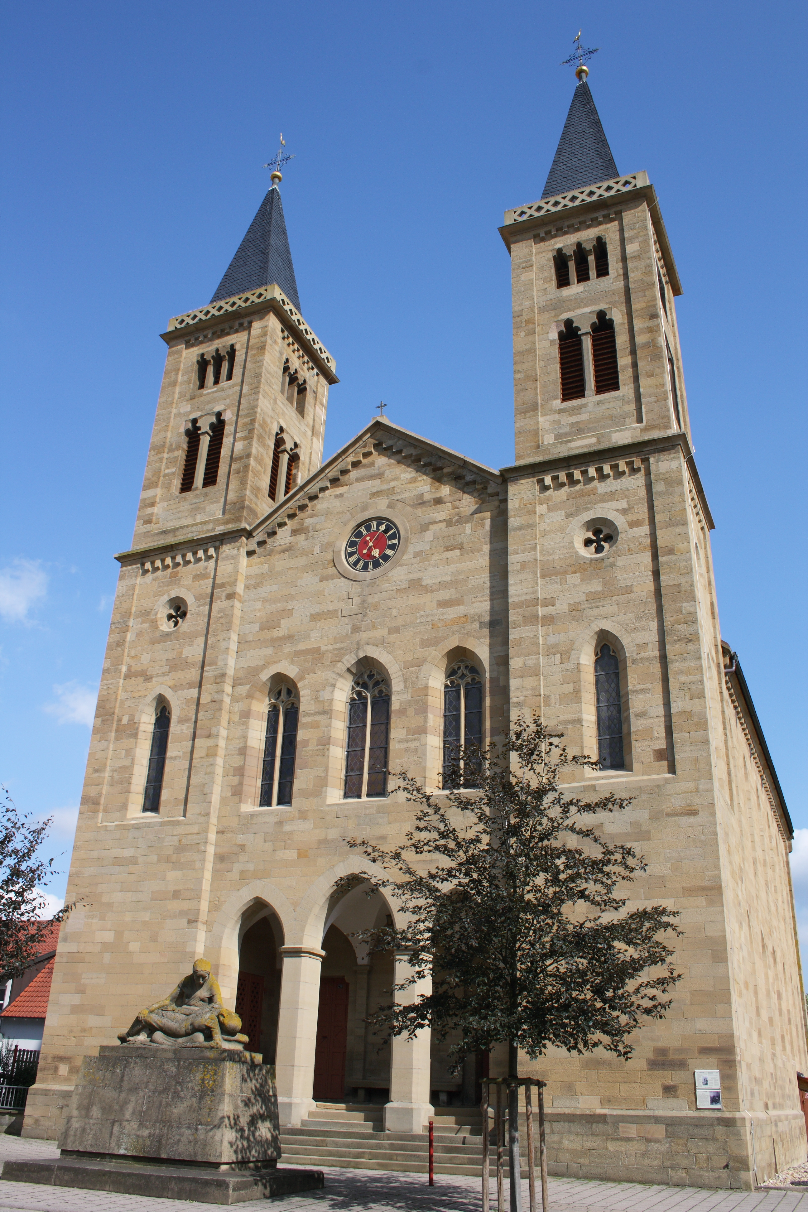 evangelische Kirche in Zaisenhausen